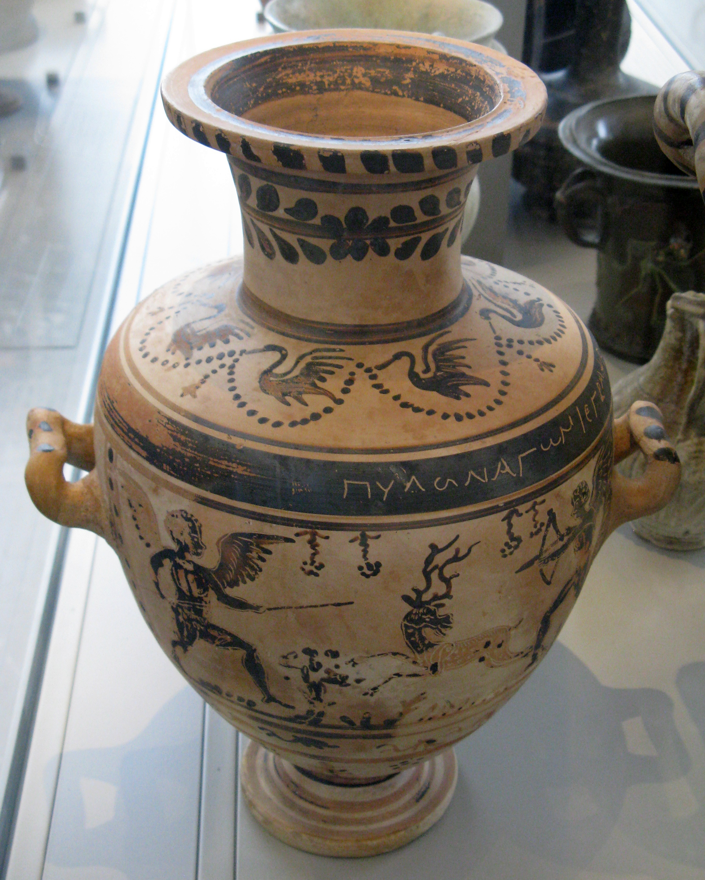 Hâdra-Hydria aus Ägypten, 3. Jahrhundert v. Chr., Antikensammlung Berlin/Altes Museum (Berlin)